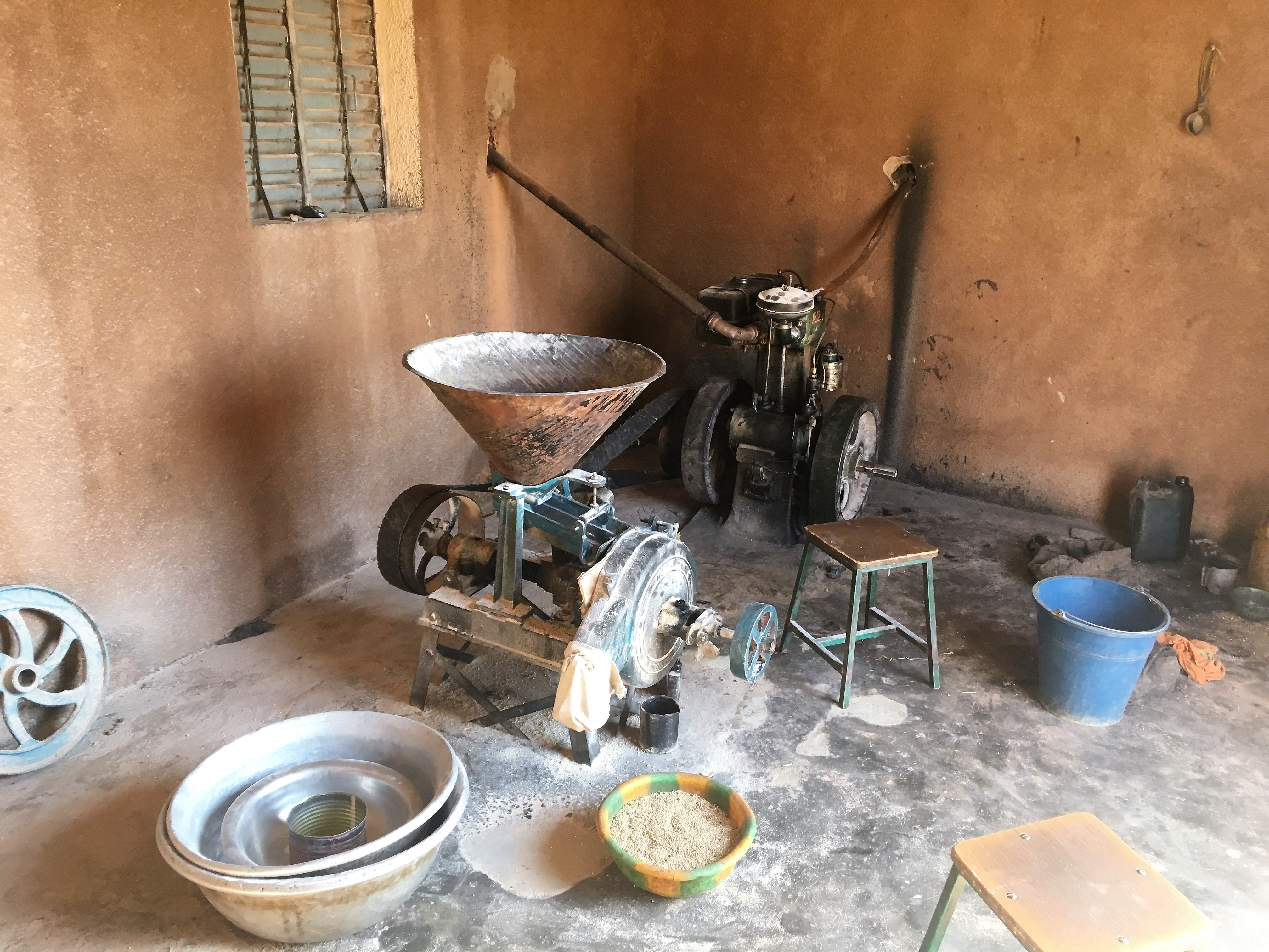 Moulin de Bogonam Mossi